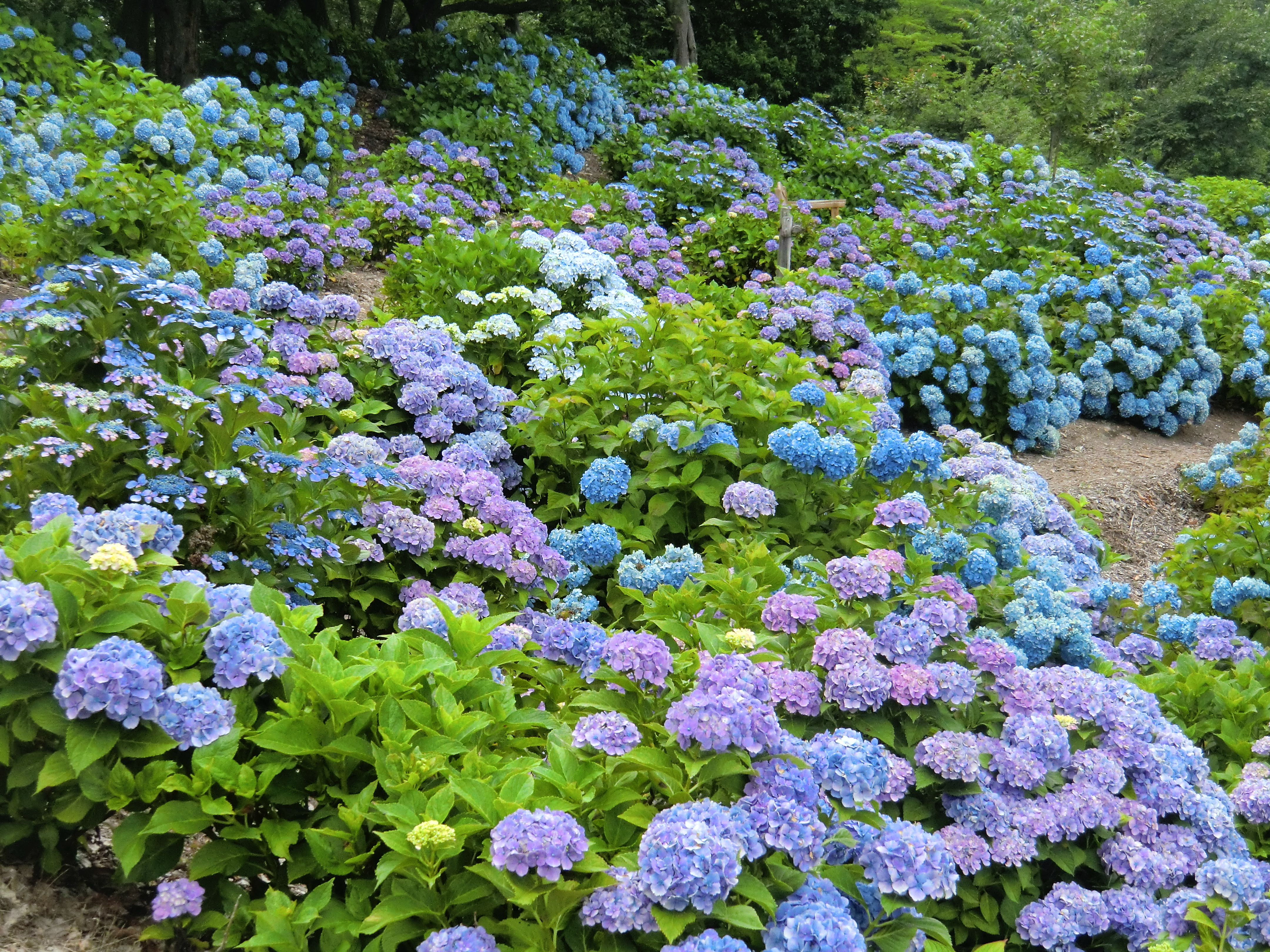 観音山で撮影した紫陽花です。